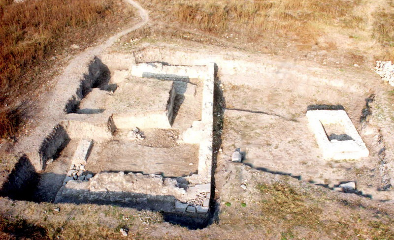 Крепостта "Ковачевско кале" до град Попово. "Вътрешният" сектор в процес на проучване.